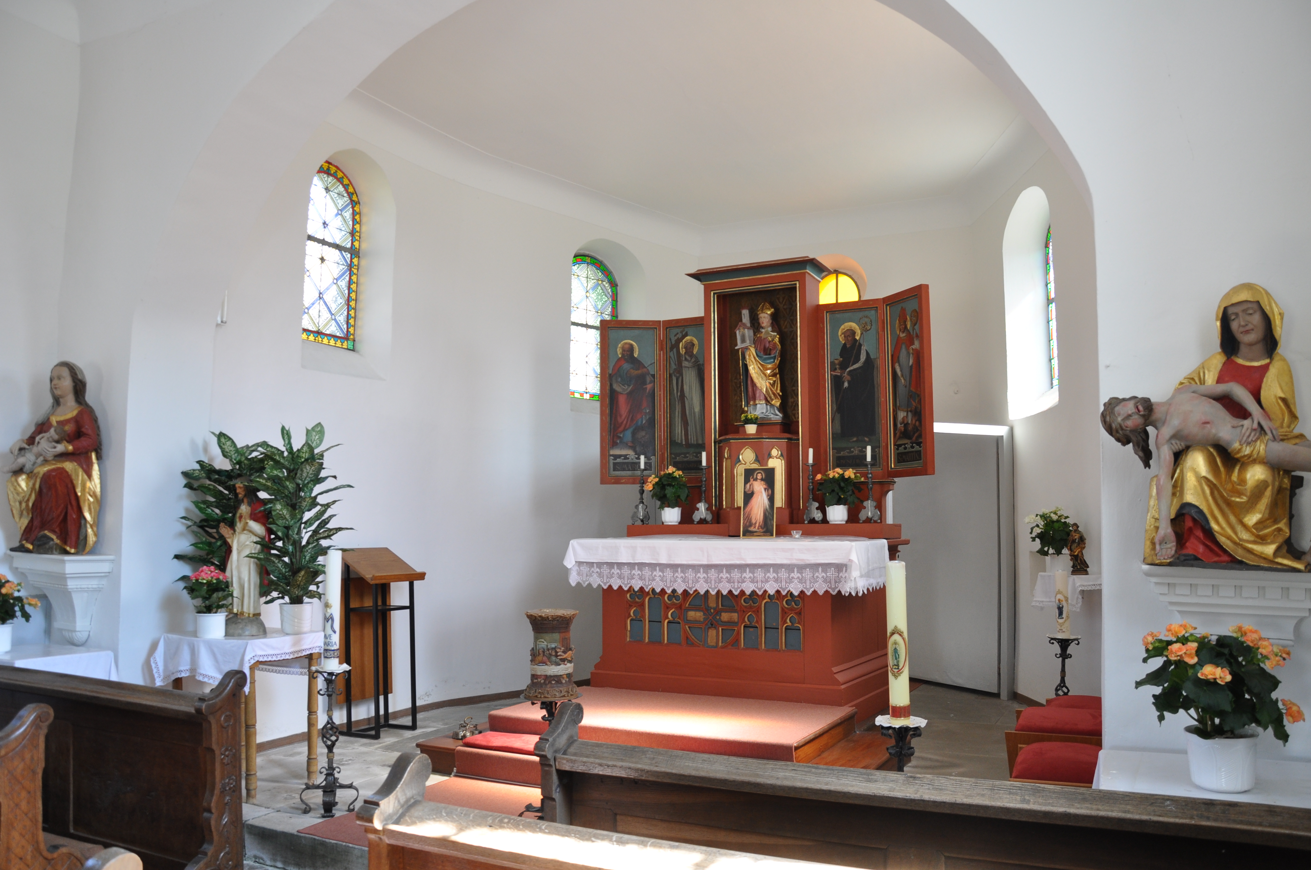 Hippetsweiler, Gemeinde Wald, Landkreis Sigmaringen; Kapelle St. Wolfgang